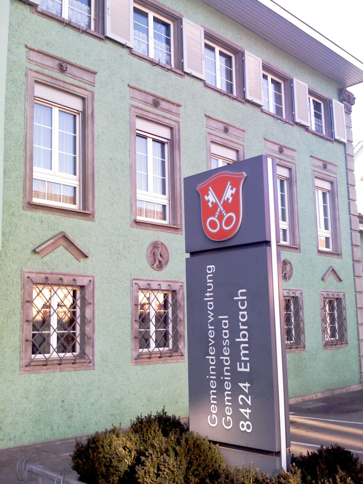 Embrach Municipality - Komunuma domo de Embrach